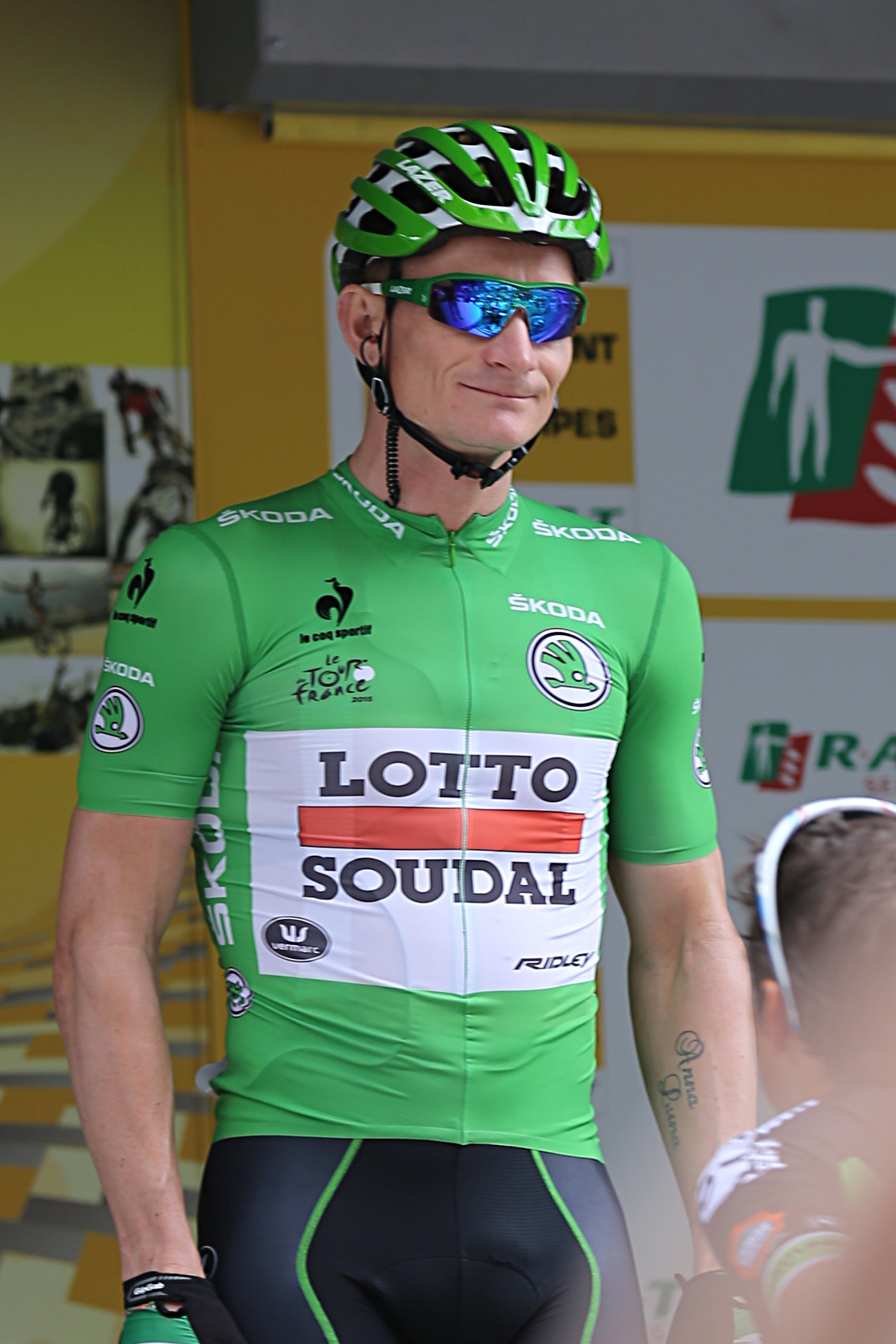 André Greipel lors du départ de la 8e étape du Tour de France 2015 à Rennes.